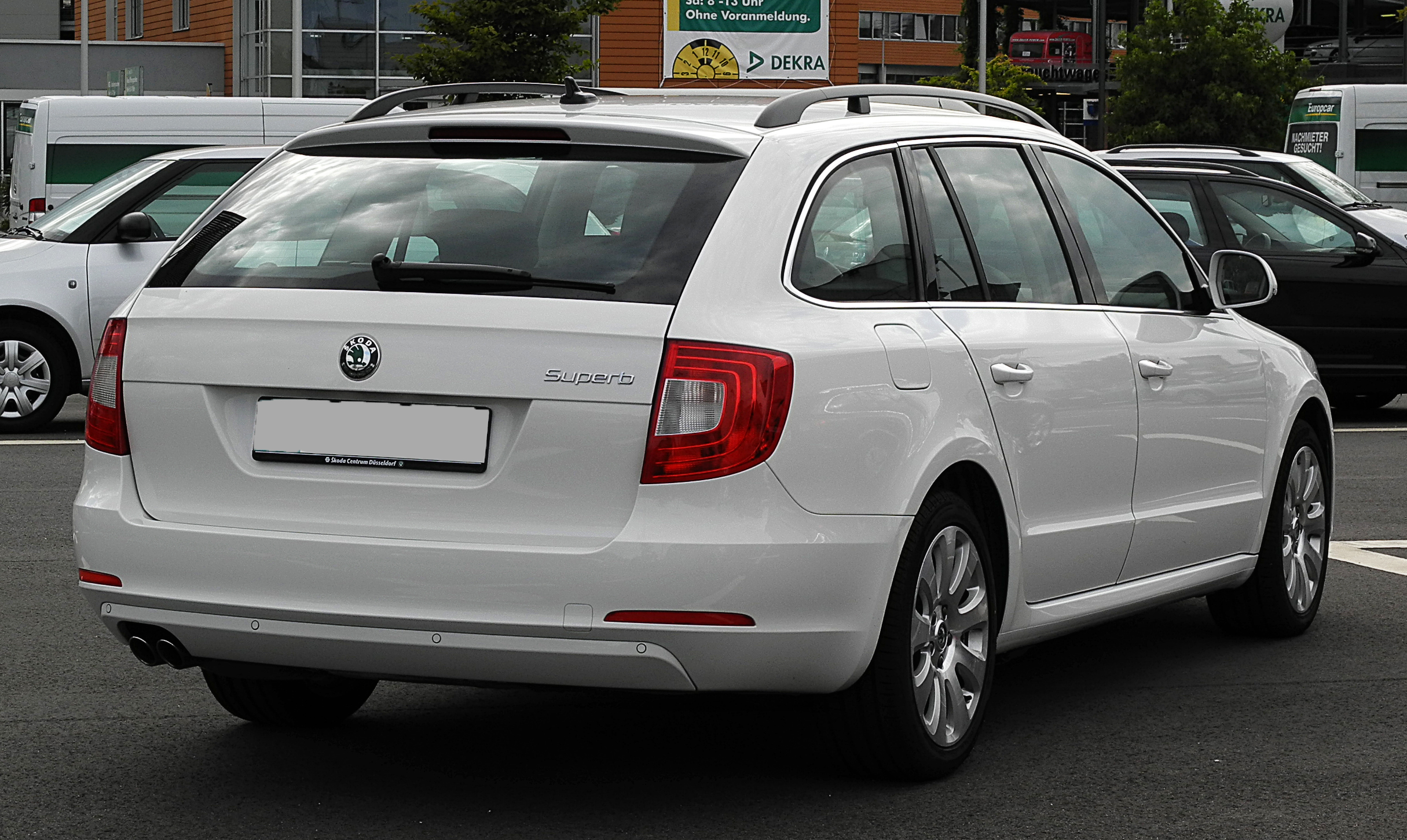 Skoda Superb Combi 2.0 TDI Ambition (II)